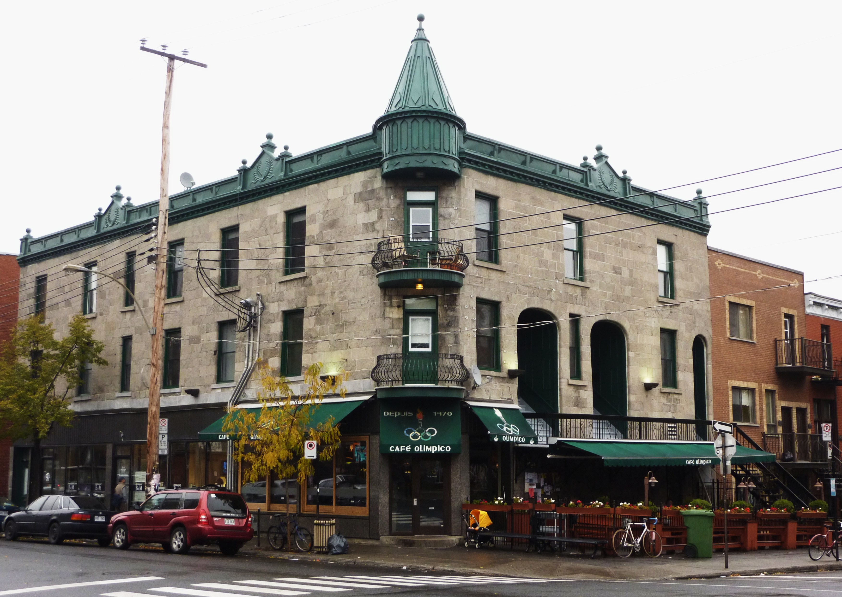 Coin de rue incontournable. Mise en valeur exemplaire d'un bâtiment à tourelle d'angle; remarquez le galbe très élégant du fer forgé pour les balcons de l'encoignure. Ouvertures et ornementations d'origine. Pierre grise de Montréal et...excellent café. Voyez ce bâtiment d'un autre angle